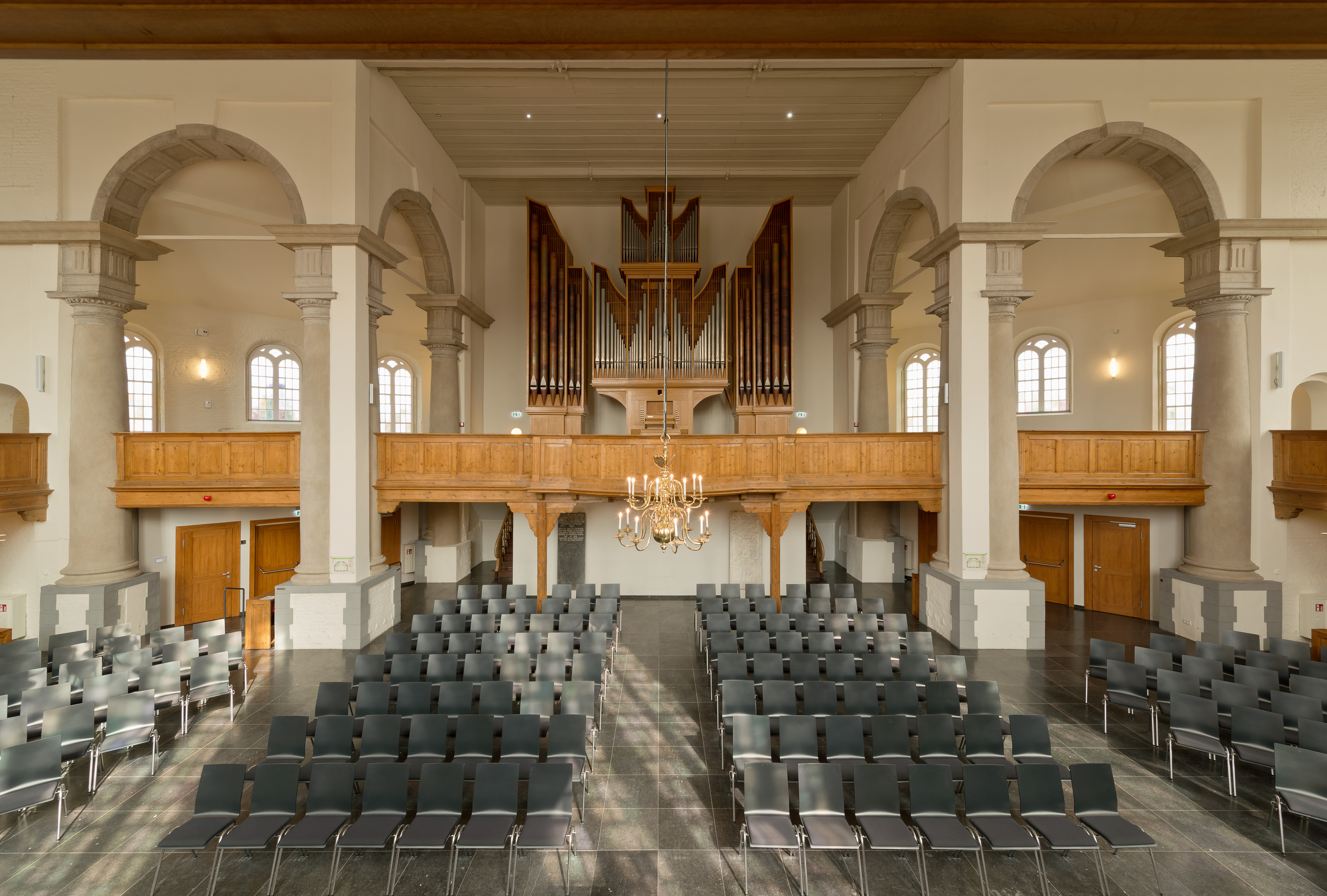 Ostansicht der Neuen Kirche Emden, Ostfriesland, Niedersachsen, Deutschland